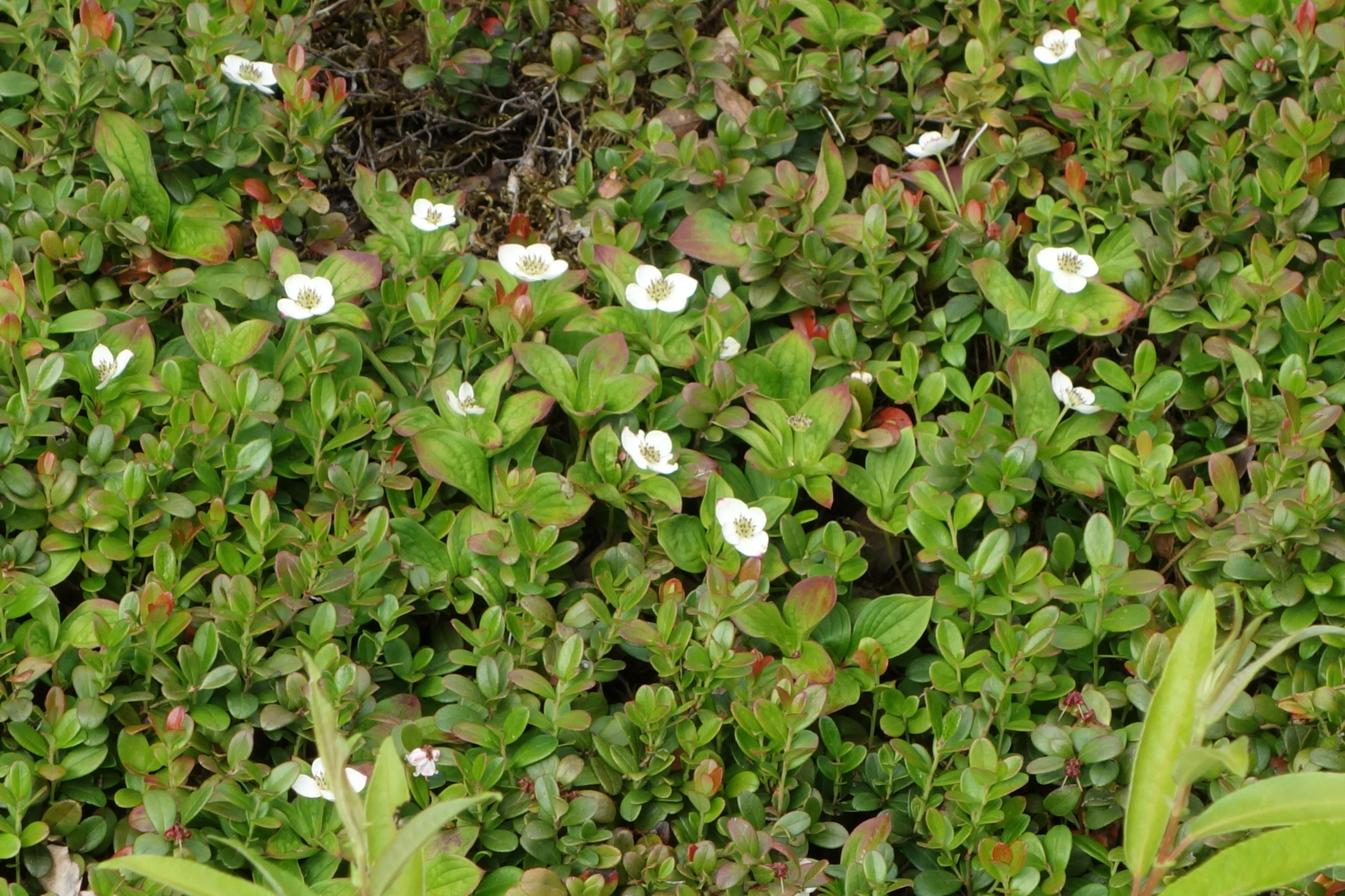 長走風穴に咲く、ゴゼンタチバナ。５号観望デッキから。 国指定天然記念物第１植物群落のエリア。 この日は、オオタカネバラ、ヤナギラン、コキンバイ、オオヤマオダマキなどの花が確認できた。